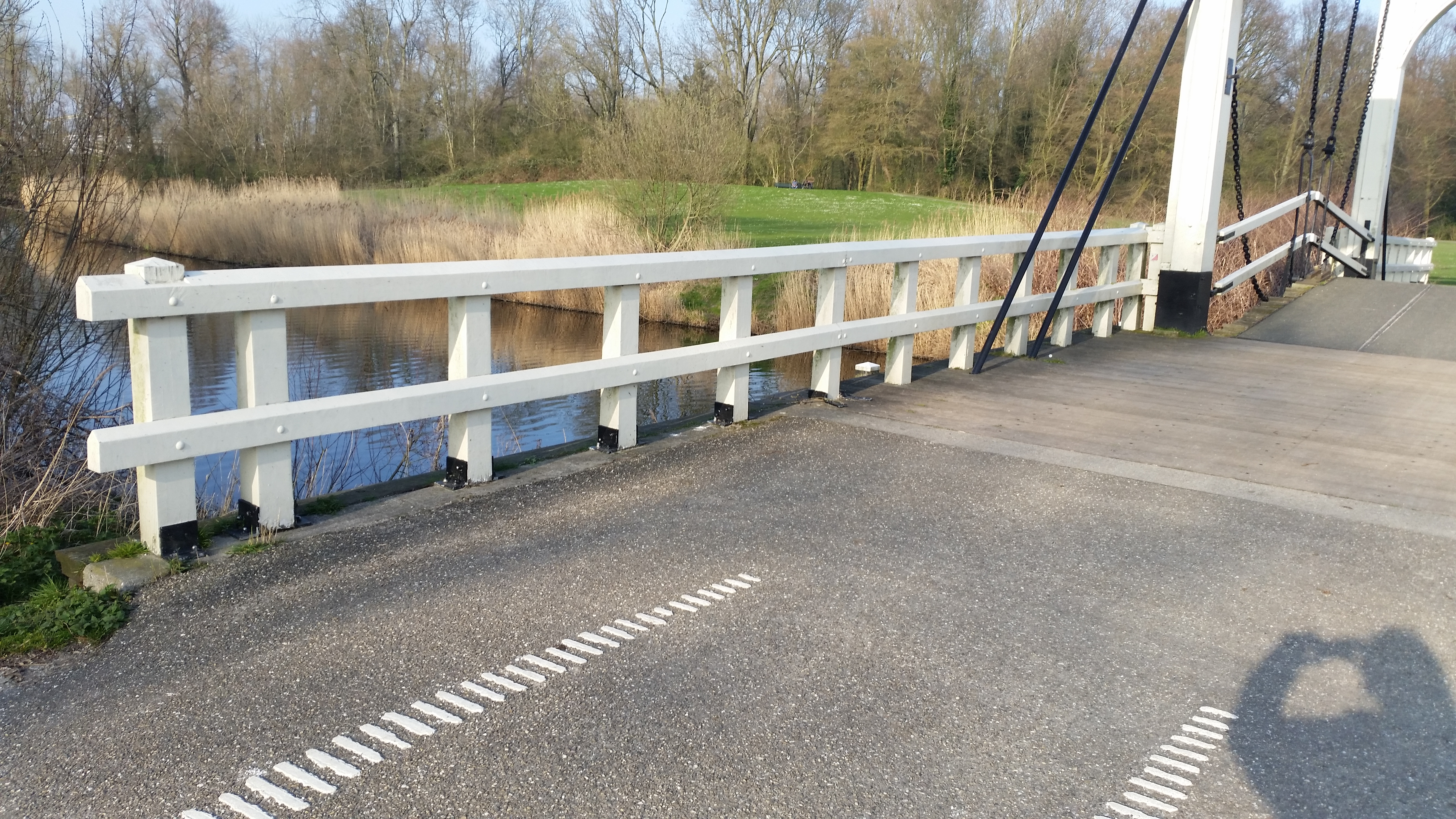 Leuning op aanbrug van Brug 504 (in Amsterdam)